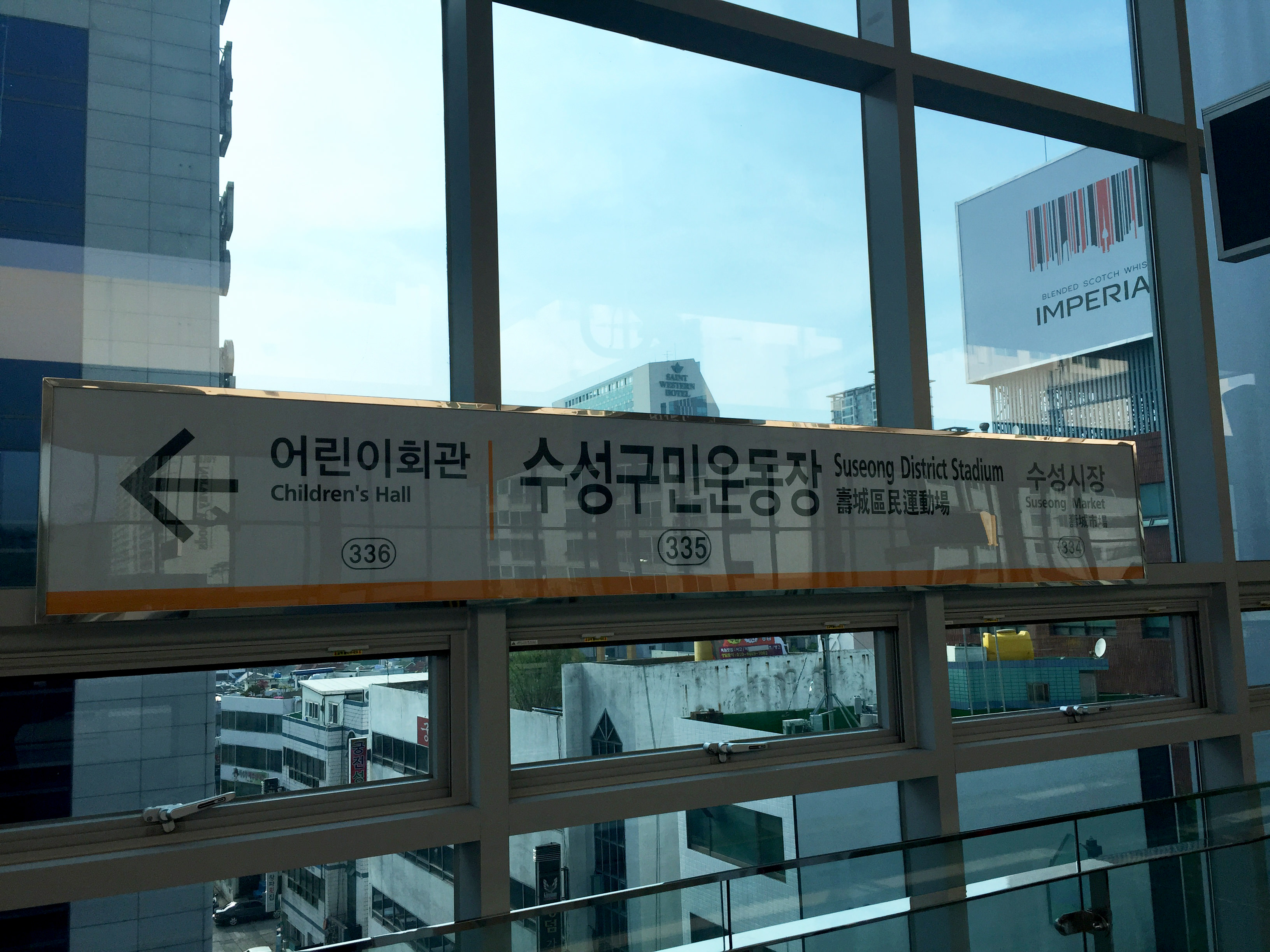 수성구민운동장역 역명판